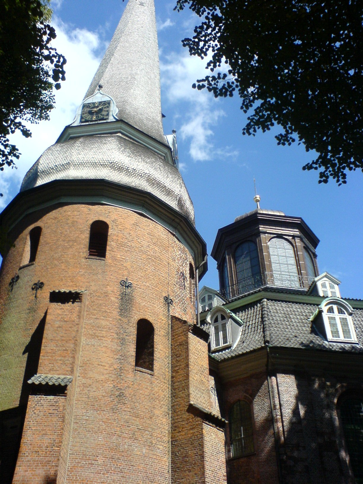 Rellinger Kirche, Turm